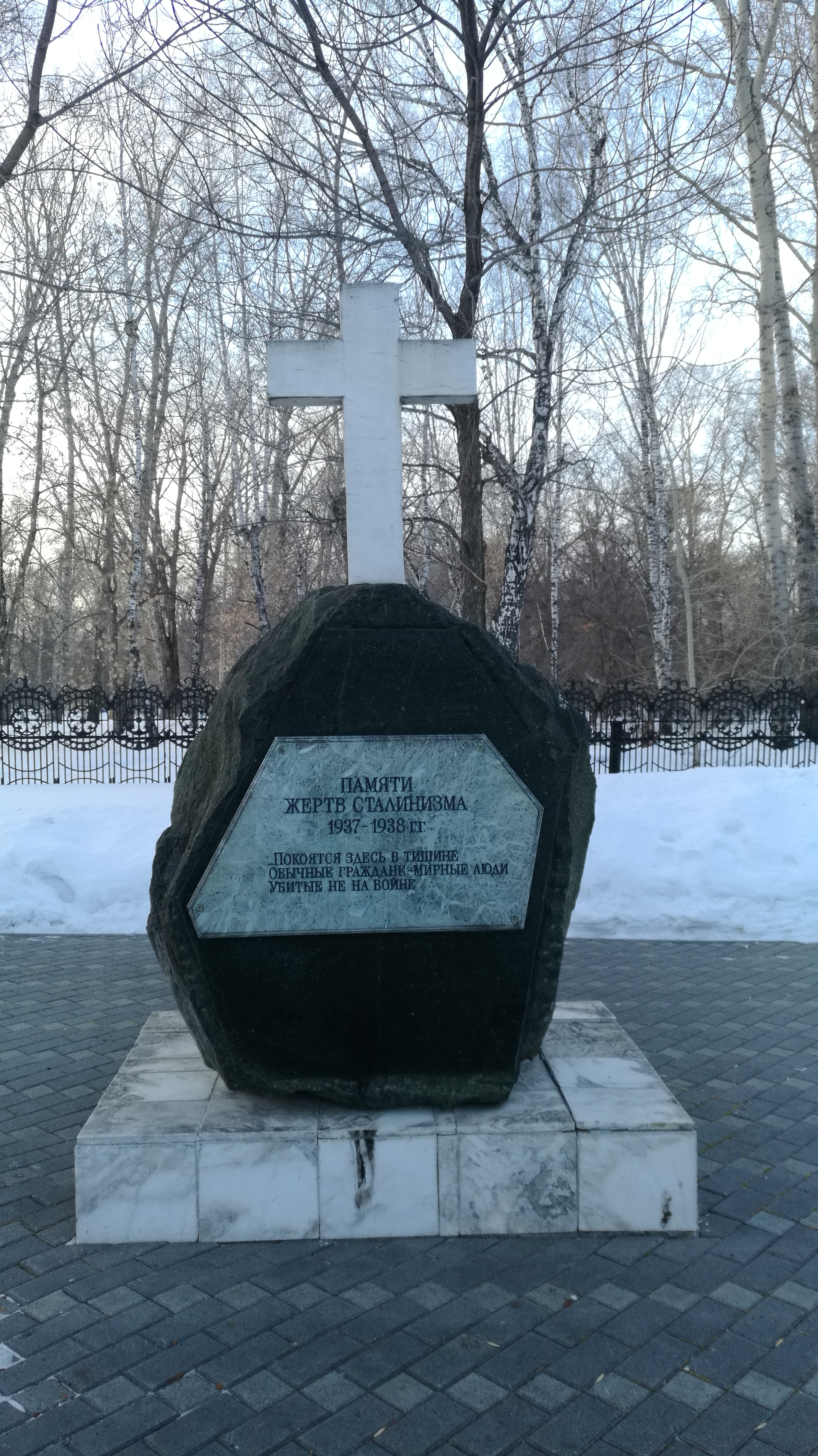 Monumento al viktimoj de stalinismo. Tjumeno, Rusio.